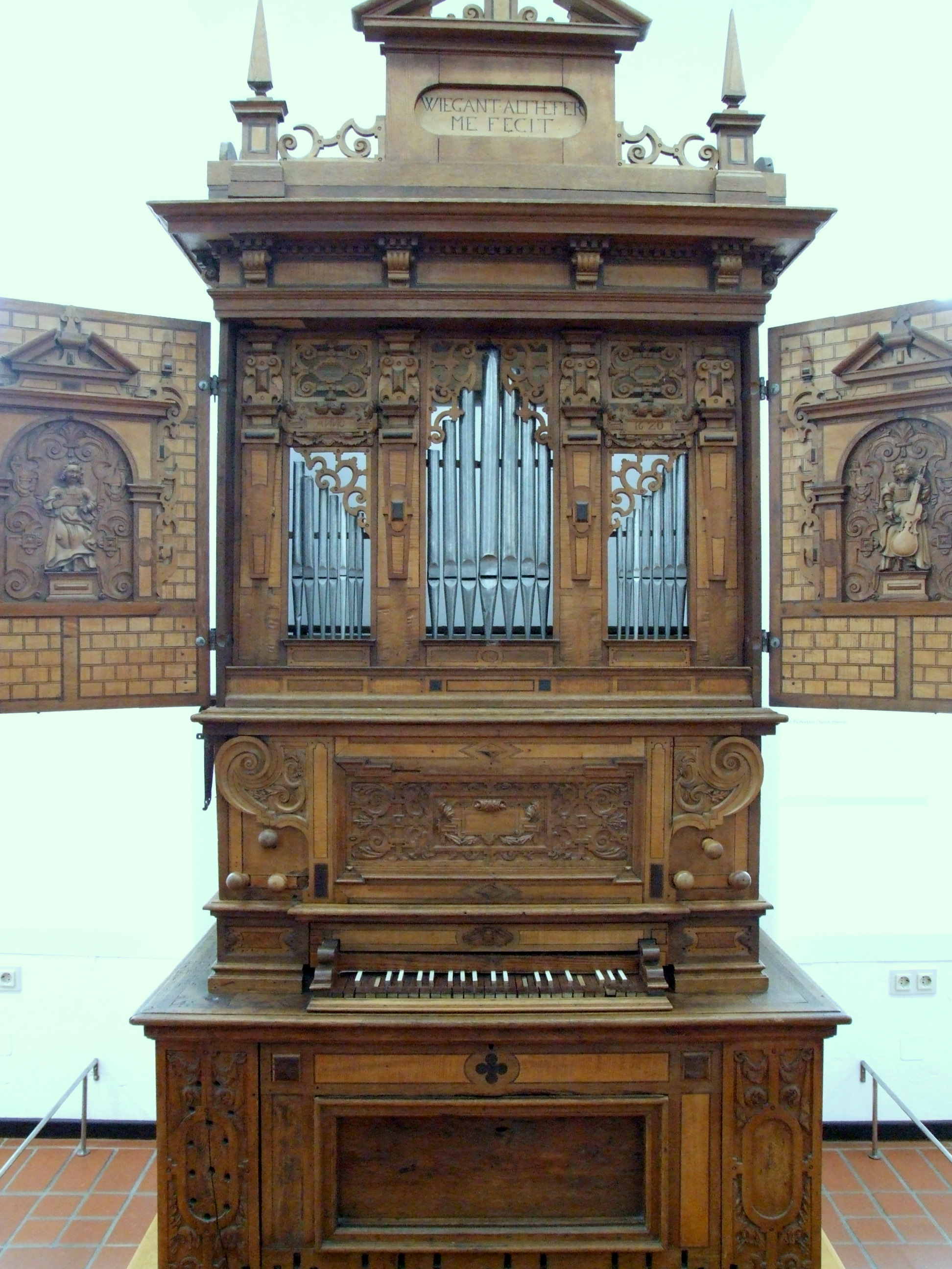 Frontalansicht der Orgel im Marburger Schloss, "Althefer Positiv"